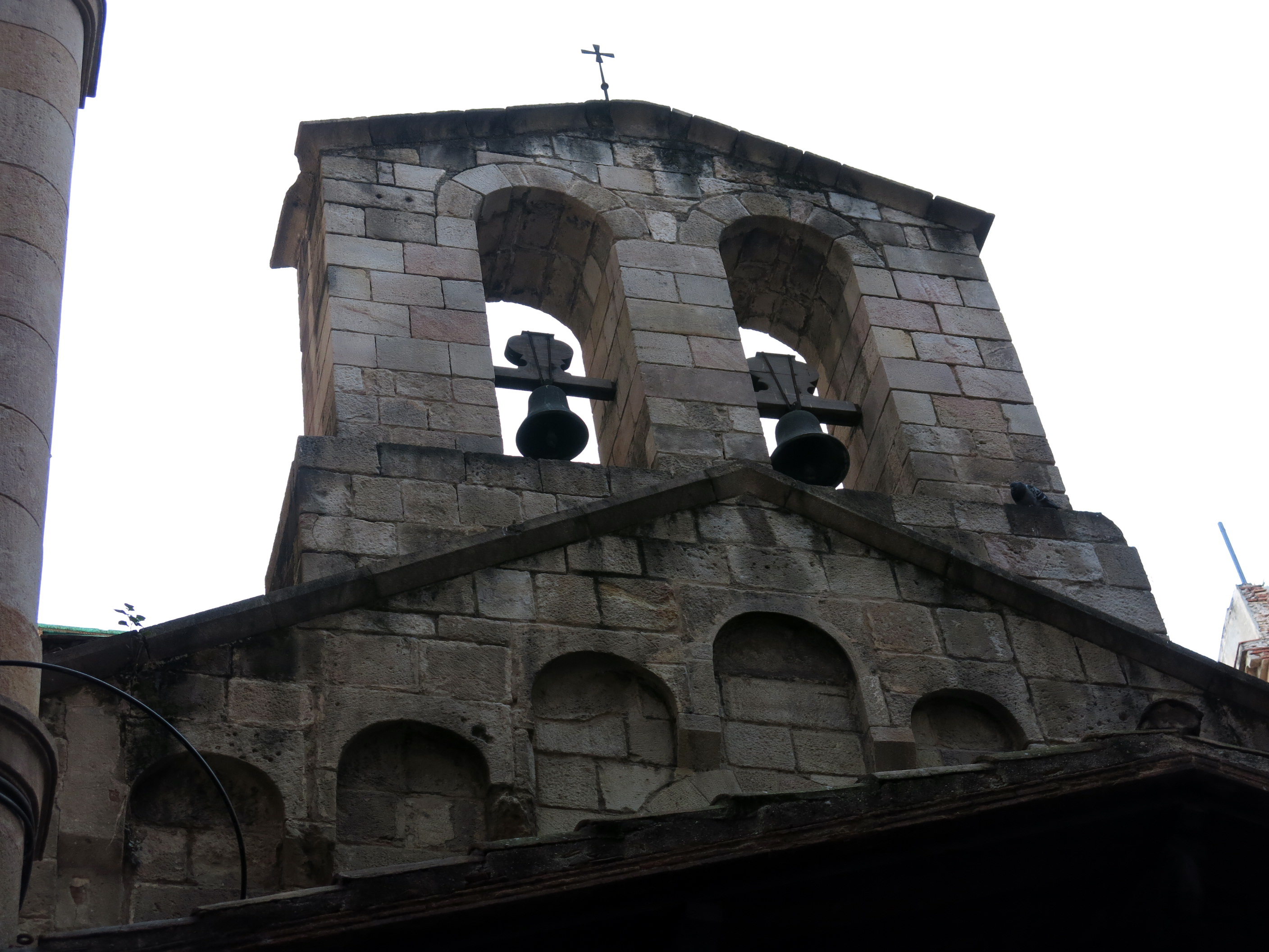 Capella de la Mare de Déu de la Guia (Barcelona)